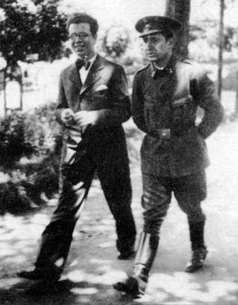 Francisco Fernández del Riego e Ricardo Carballo Calero, 1932, Alameda de Santiago de Compostela